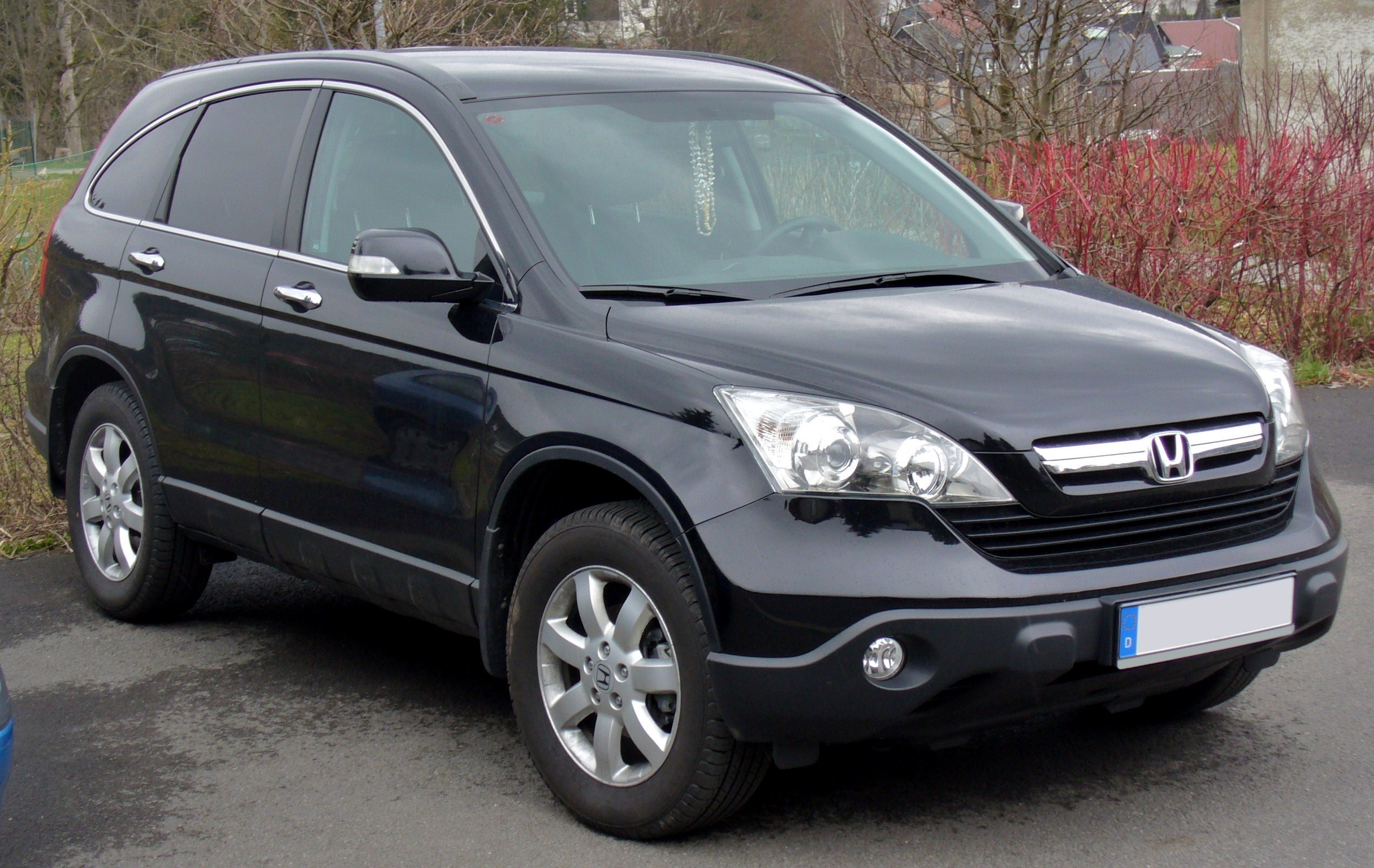 Honda CR-V